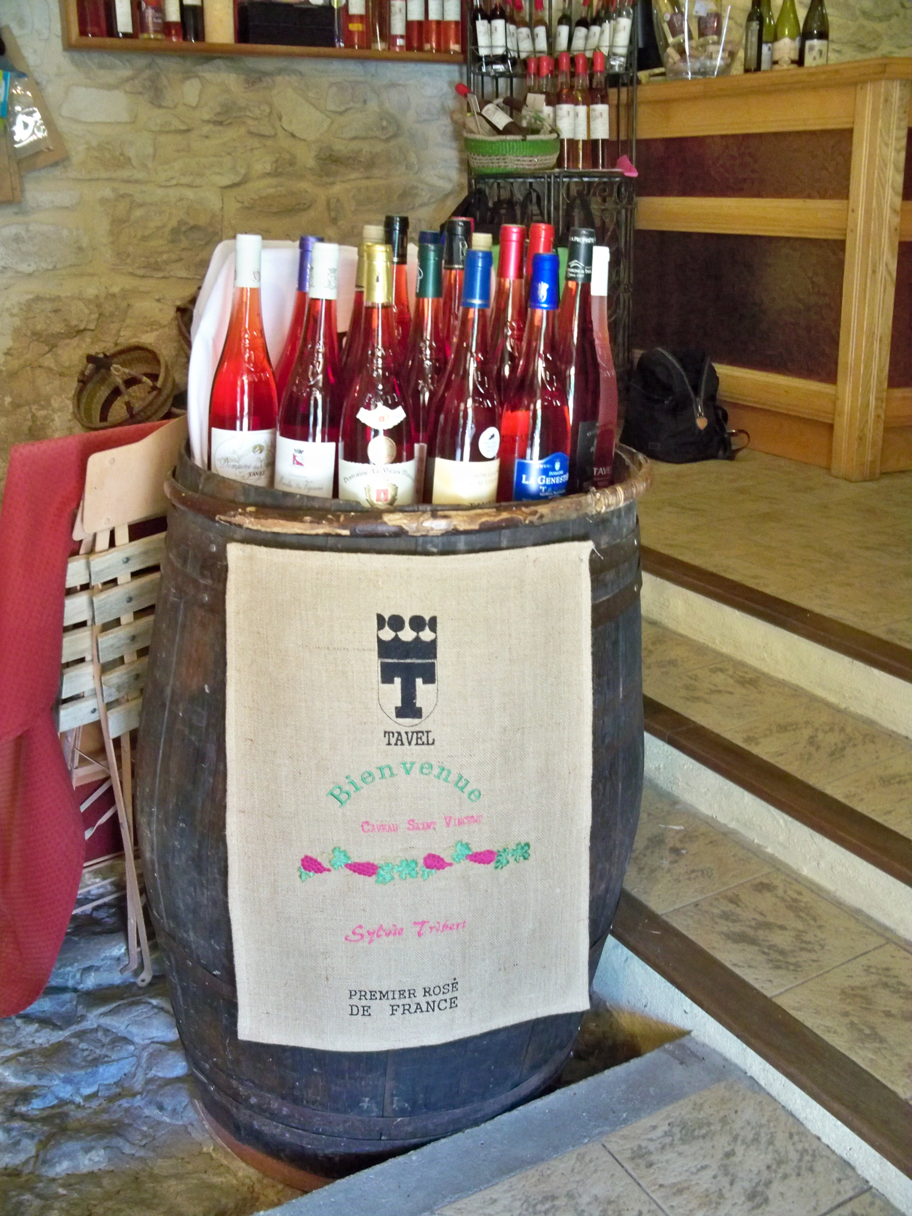 Tonneau et bouteilles à Tavel (Gard)